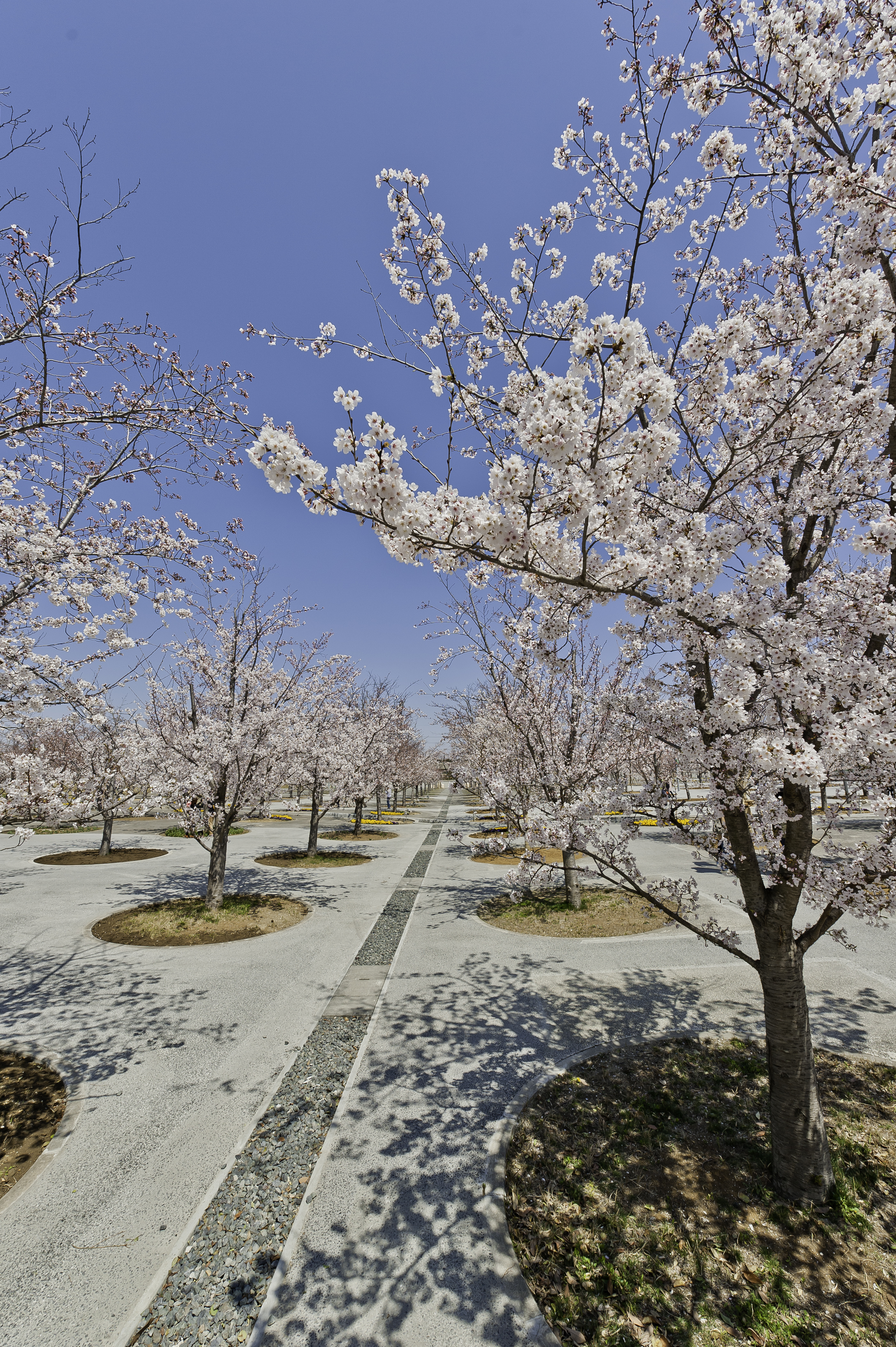 さくら公園